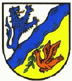 Wappen von Bedesbach